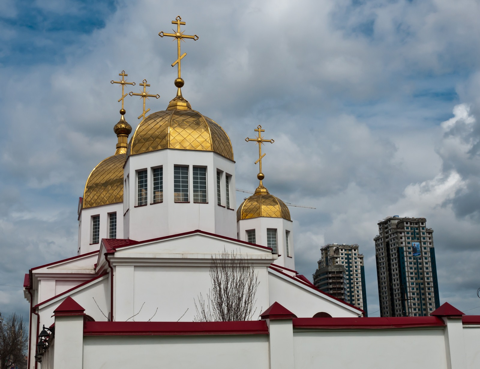 Церковь Михаила Архангела в Грозном. Построена в 1892 году.